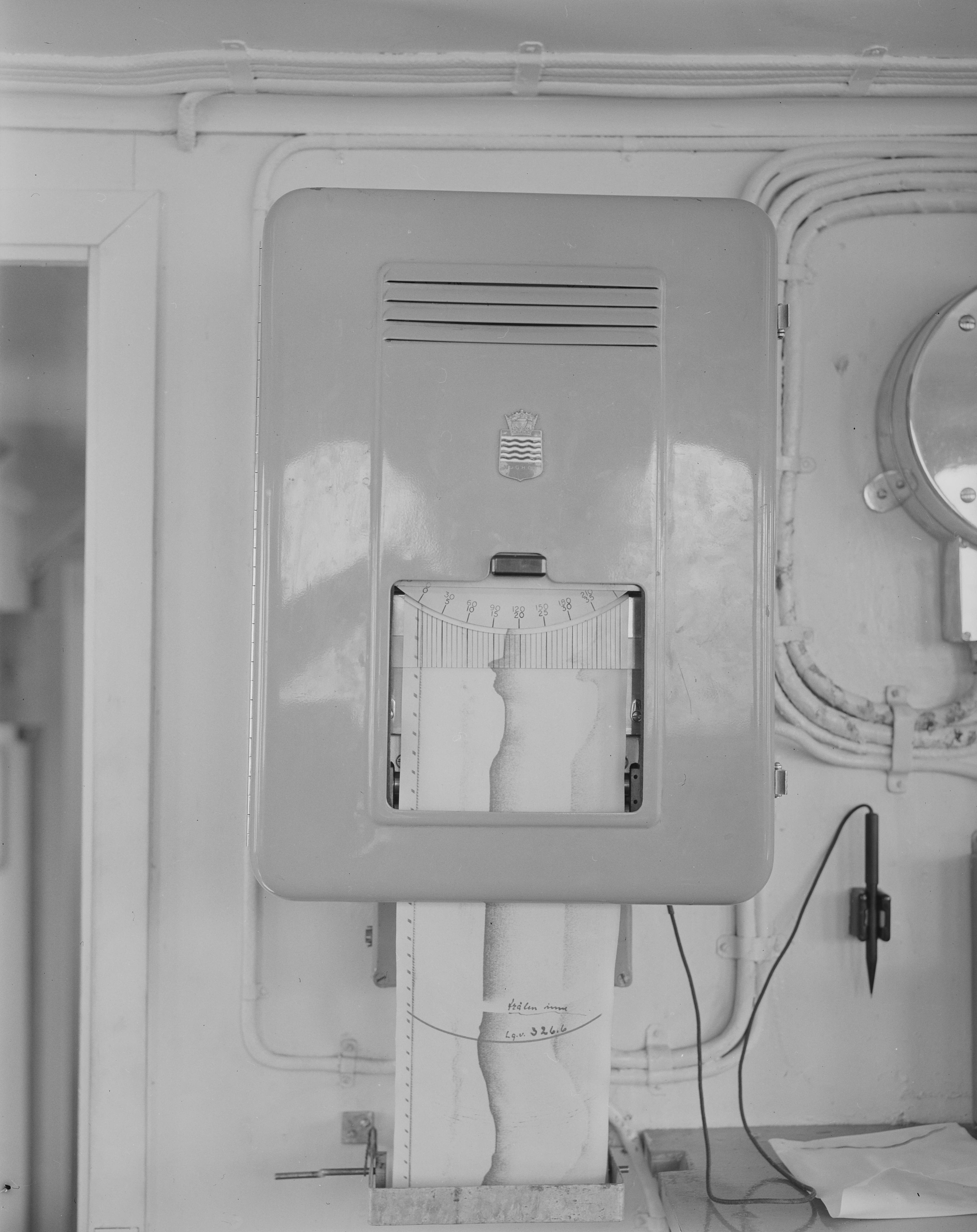 Bildet er hentet fra Nasjonalbibliotekets bildesamling. Anmerkninger til bildet var: Fotograf : ukjent Lofoten, Nordland